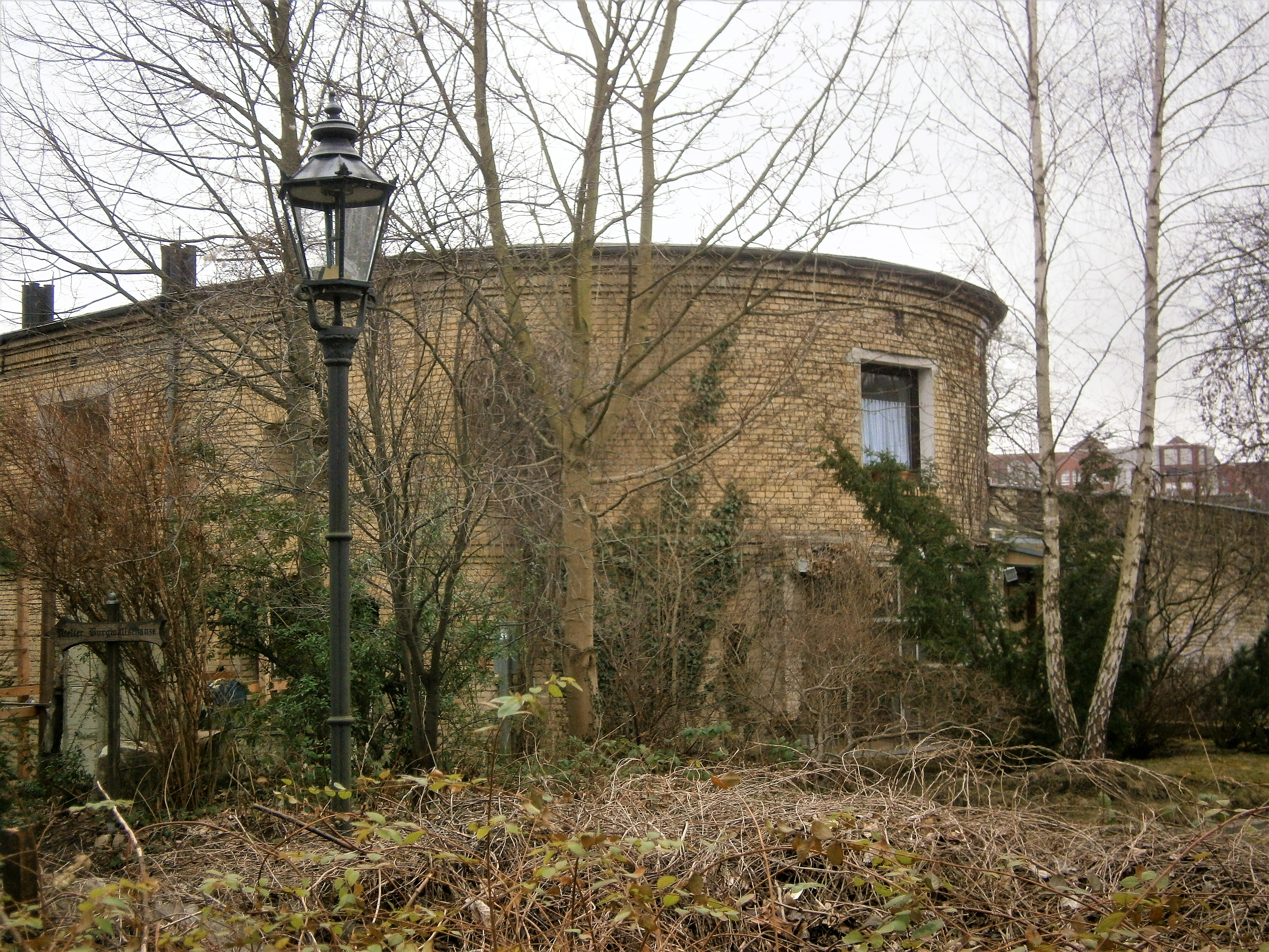 An der Ruhlebener Straße im Berliner Bezirk Spandau, Ortsteil Spandau, Ortslage Stresow, befindet sich nach dem Abriss der Burgwallschanze im Jahr 1903 noch deren Reduit (Kernwerk). Das rerstliche Bauwerk steht auf der Berliner Denkmalliste. Die nahegelegene Straßenführung wurde als Umgehungsstraße in den 1960er Jahren angelegt.